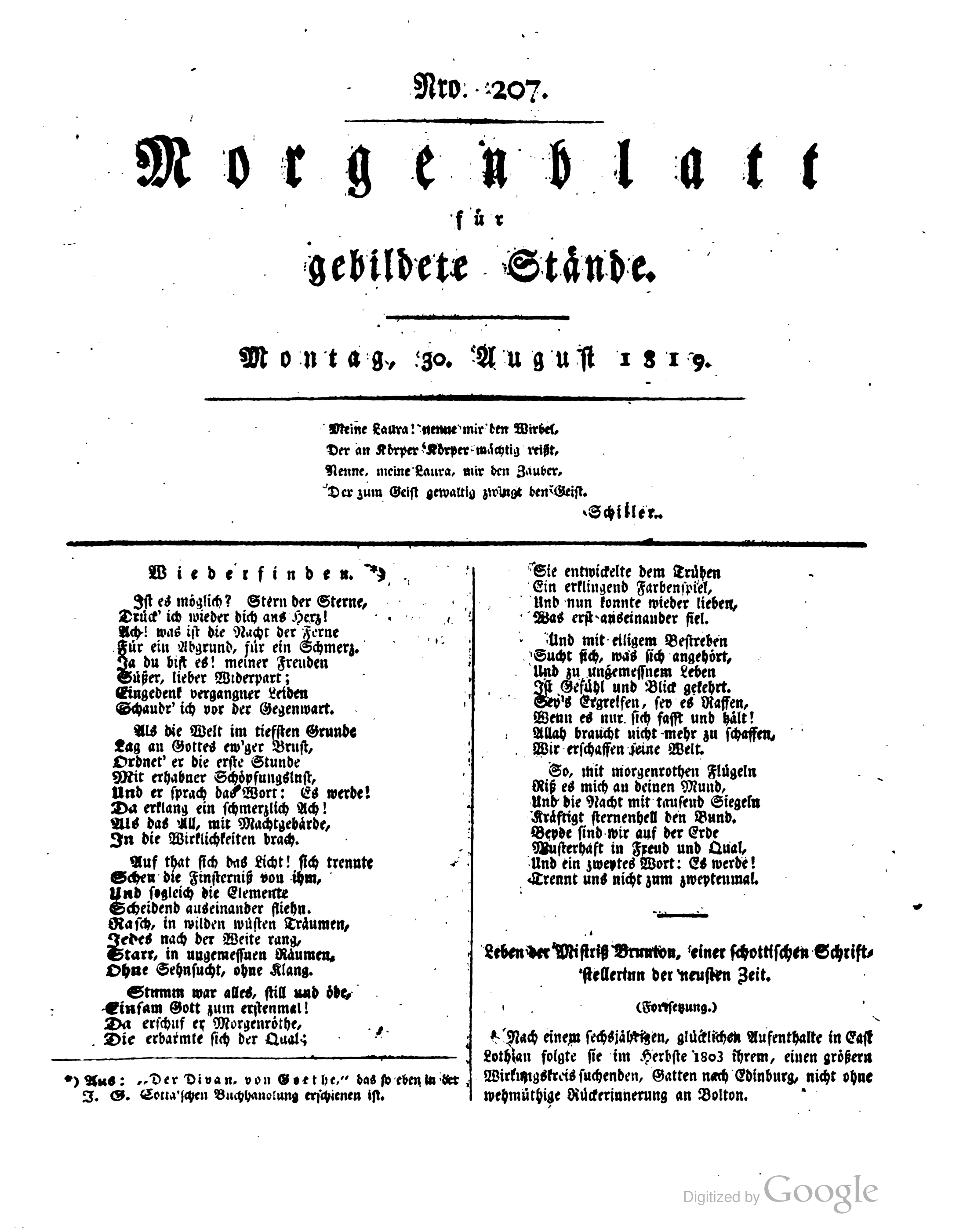 Wiederfinden. In: Morgenblatt für gebildete Leser. Stuttgart und Tübingen: Cotta. Nr. 207, S. 825